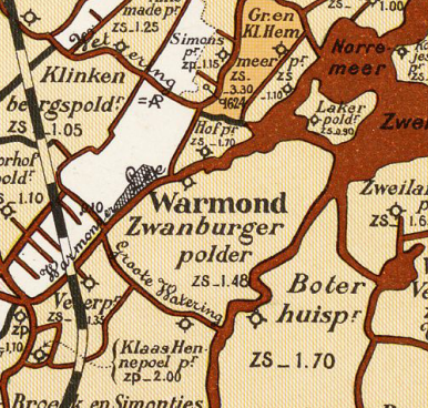 Zwanburgerpolder